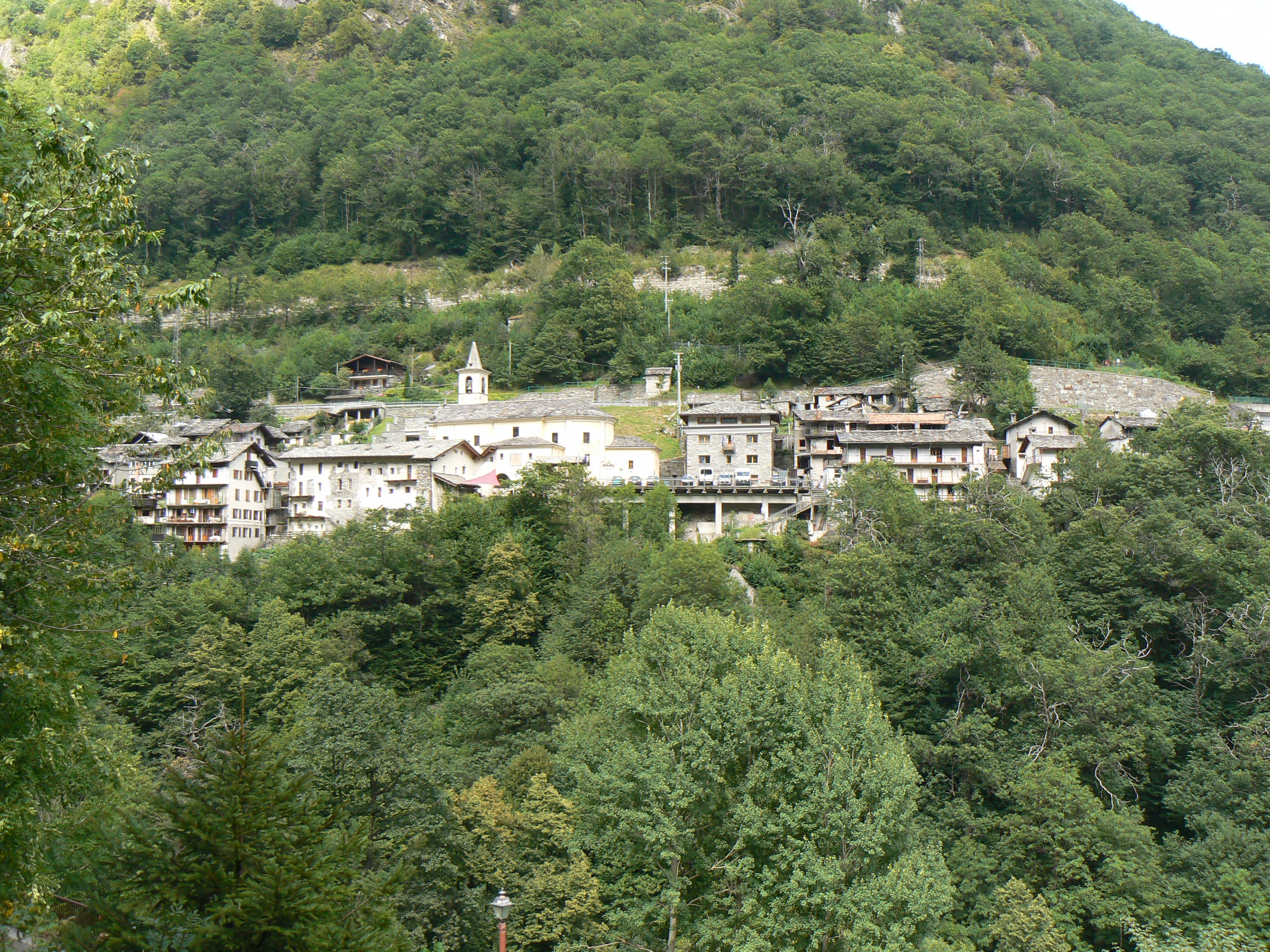 Pontboset, Valle d'Aosta, Italia.